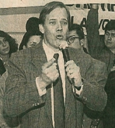 Cristián Reitze, político chileno.